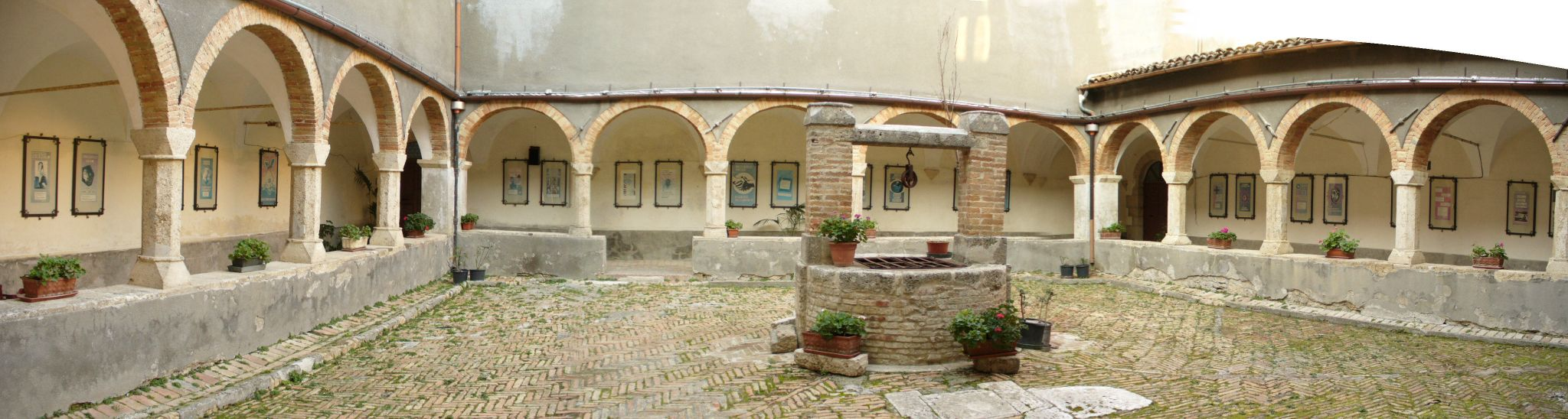 Panorama del Chiostro di Santa Maria dei Lumi, 3 immagini.Civitella del Tronto, Chiostro di Santa Maria dei Lumi